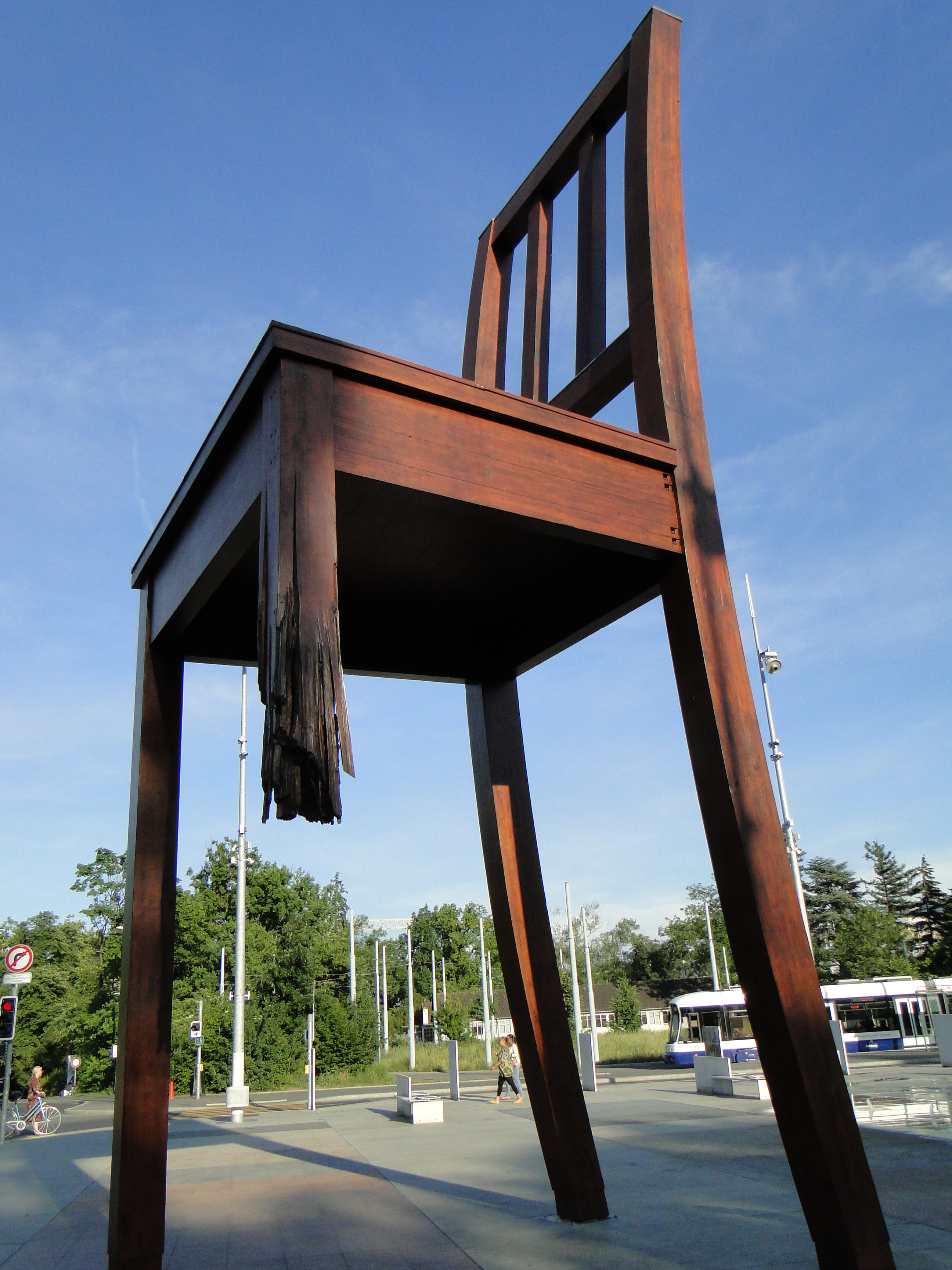 2011 Genève